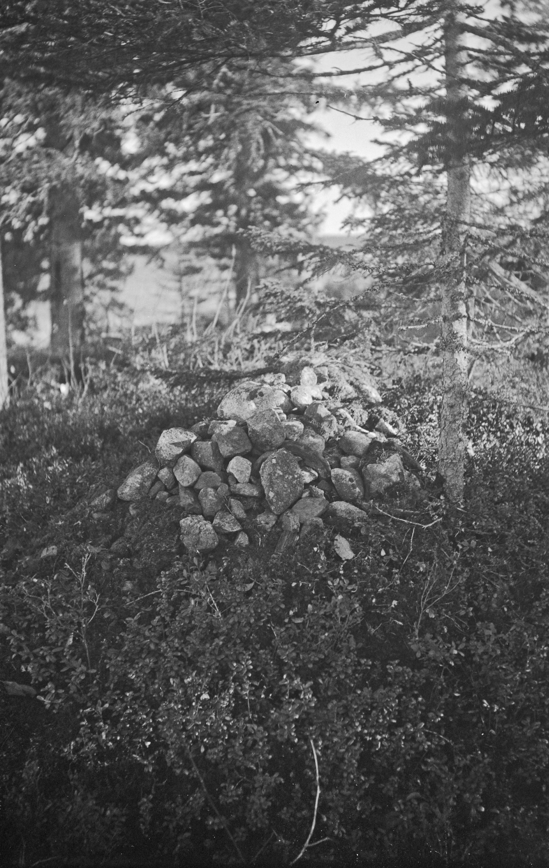 Mahdollinen Arhippa Perttusen hautakumpu Latvajärven kalmistossa, Vuokkiniemessä, Itä-Karjalassa. Kuvattuna aikavälillä 16.8.1942 - 15.9.1942.